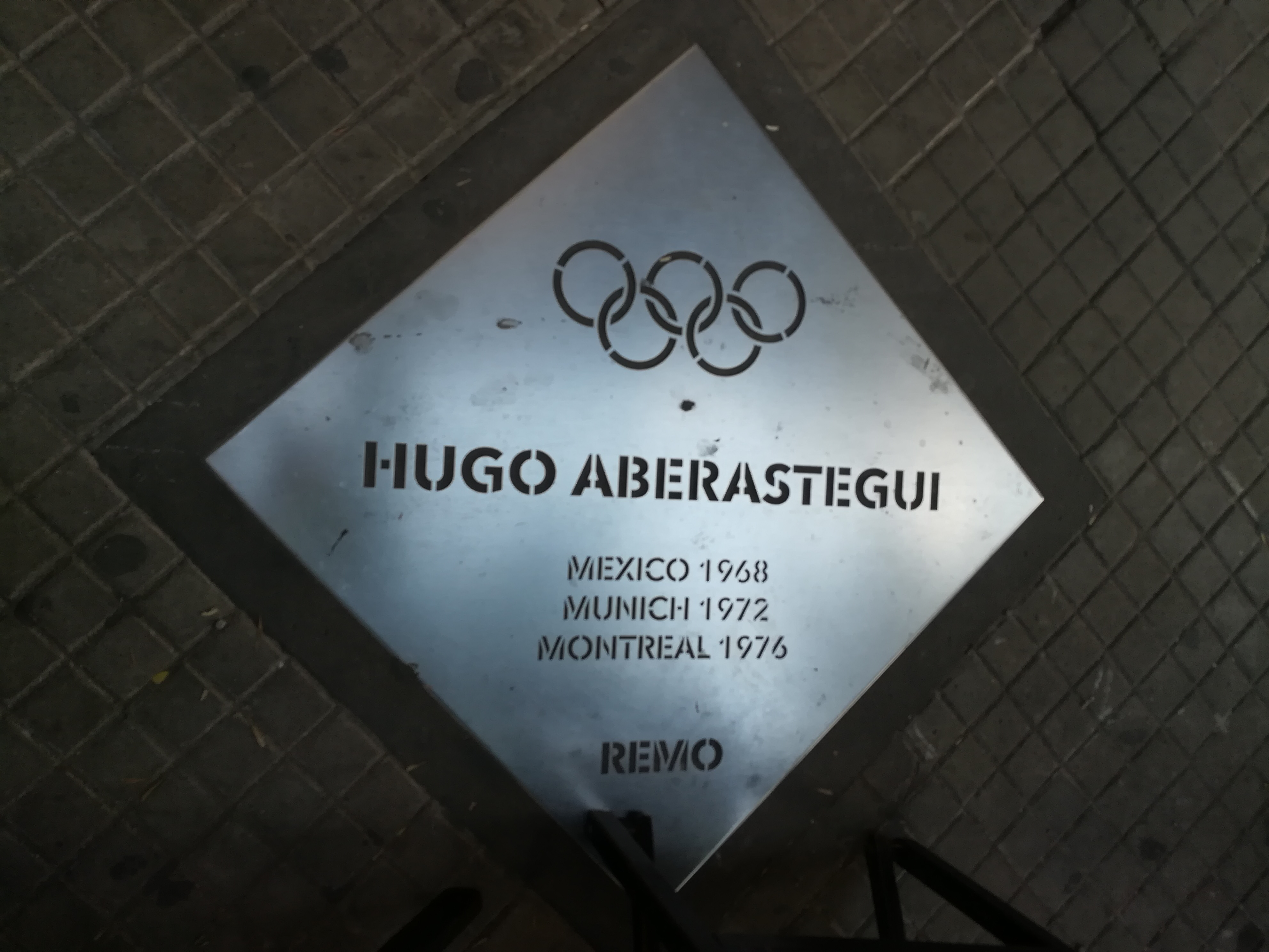 Paseo de los Olímpicos de los en la Avenida Pellegrini (Rosario).